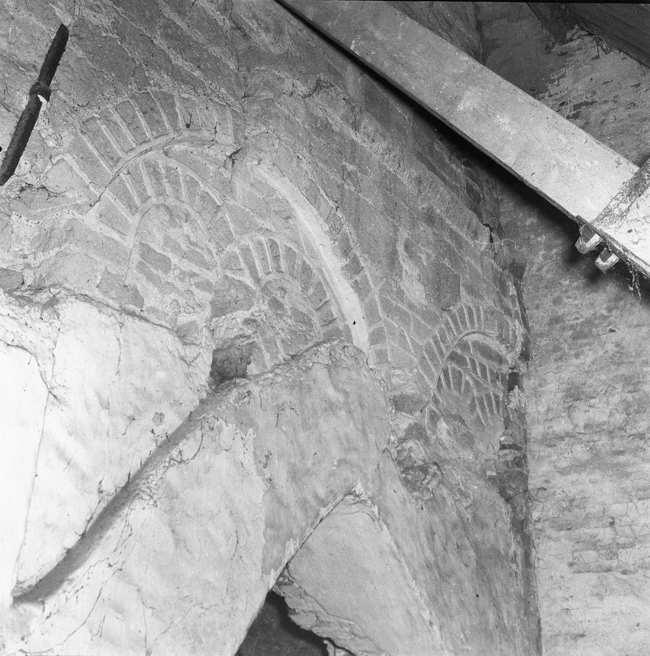 Romaans detail in toren Sint-Lambertuskerk in Kerk-Avezaath